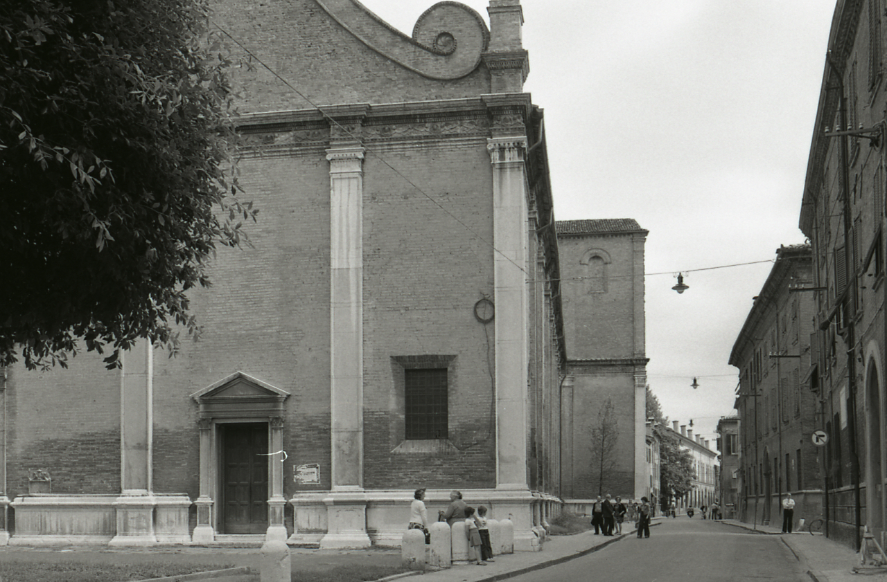 Servizio fotografico : Ferrara, 1974 / Paolo Monti. - Strisce: 7, Fotogrammi complessivi: 37 : Negativo b/n, gelatina bromuro d'argento/ pellicola ; 35 mm. - ((Sul portanegativi: N[I]K[MA]T FP4. - Occasione: Documentazione del centro storico. - Fonte: Agenda di Paolo Monti: Leica 1501-3000 Controllo numerazione (1950-1978), presso Archivio Paolo Monti. - Fonte: Fattura di Paolo Monti: IV. Commesse/ Fattura n. 18/ Riprese fotografiche del centro storico (Mostra Vitalità del centro storico) (1974/10/16), presso Archivio Paolo Monti